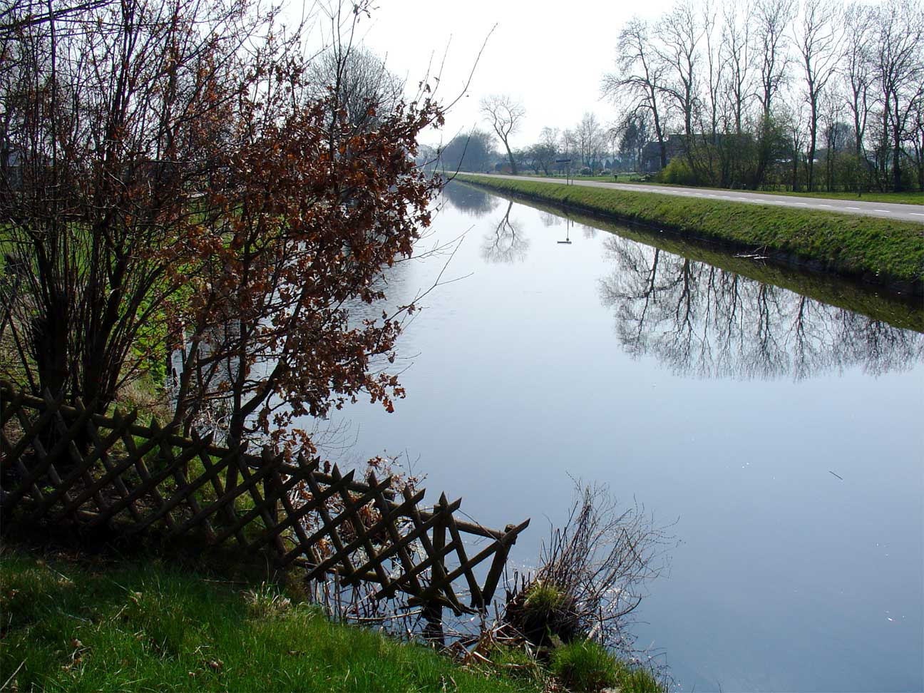 Beilervaart ter hoogte Hijkerbrug